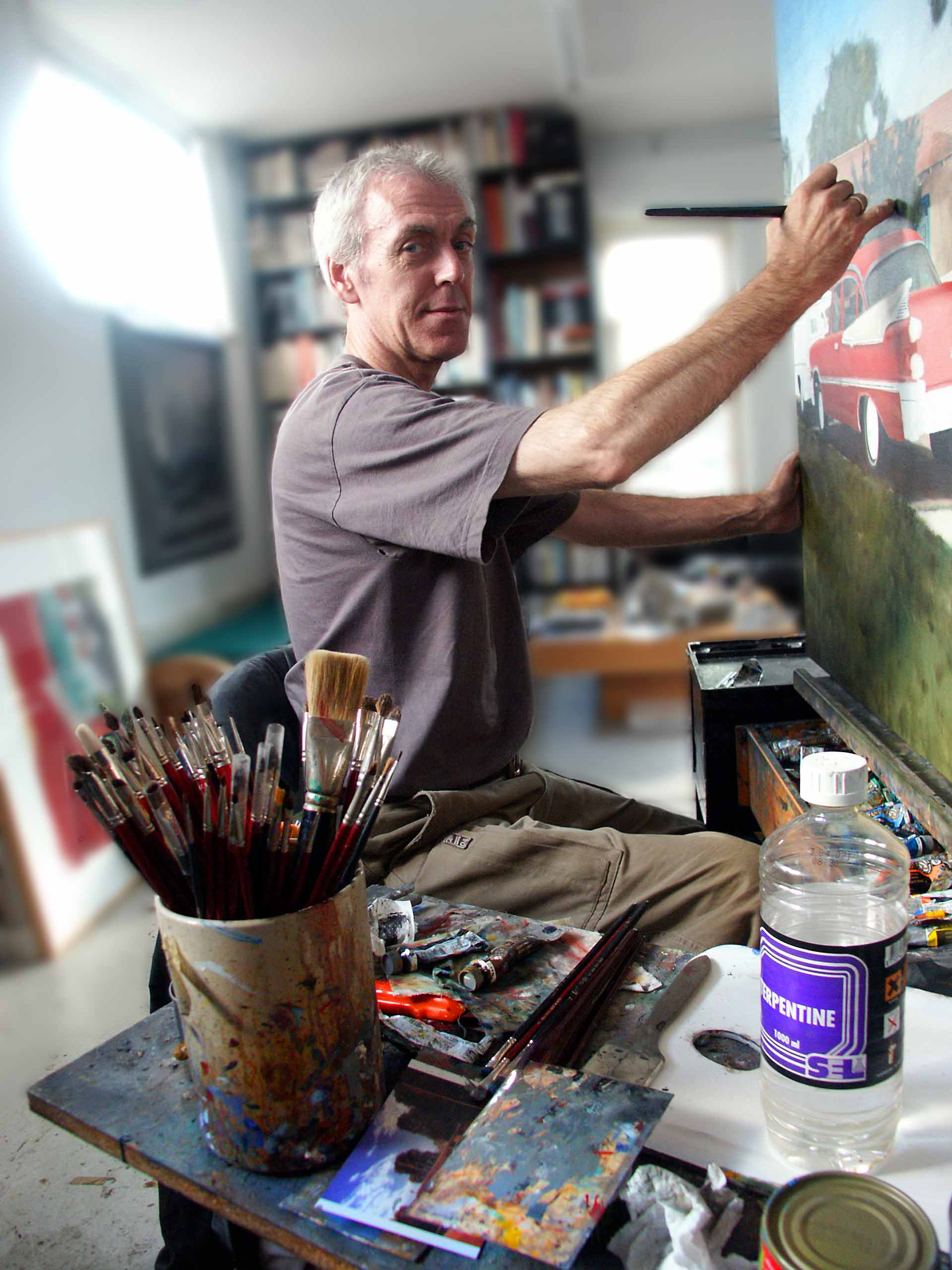 Zelfgemaakt foto van Araun Gordijn